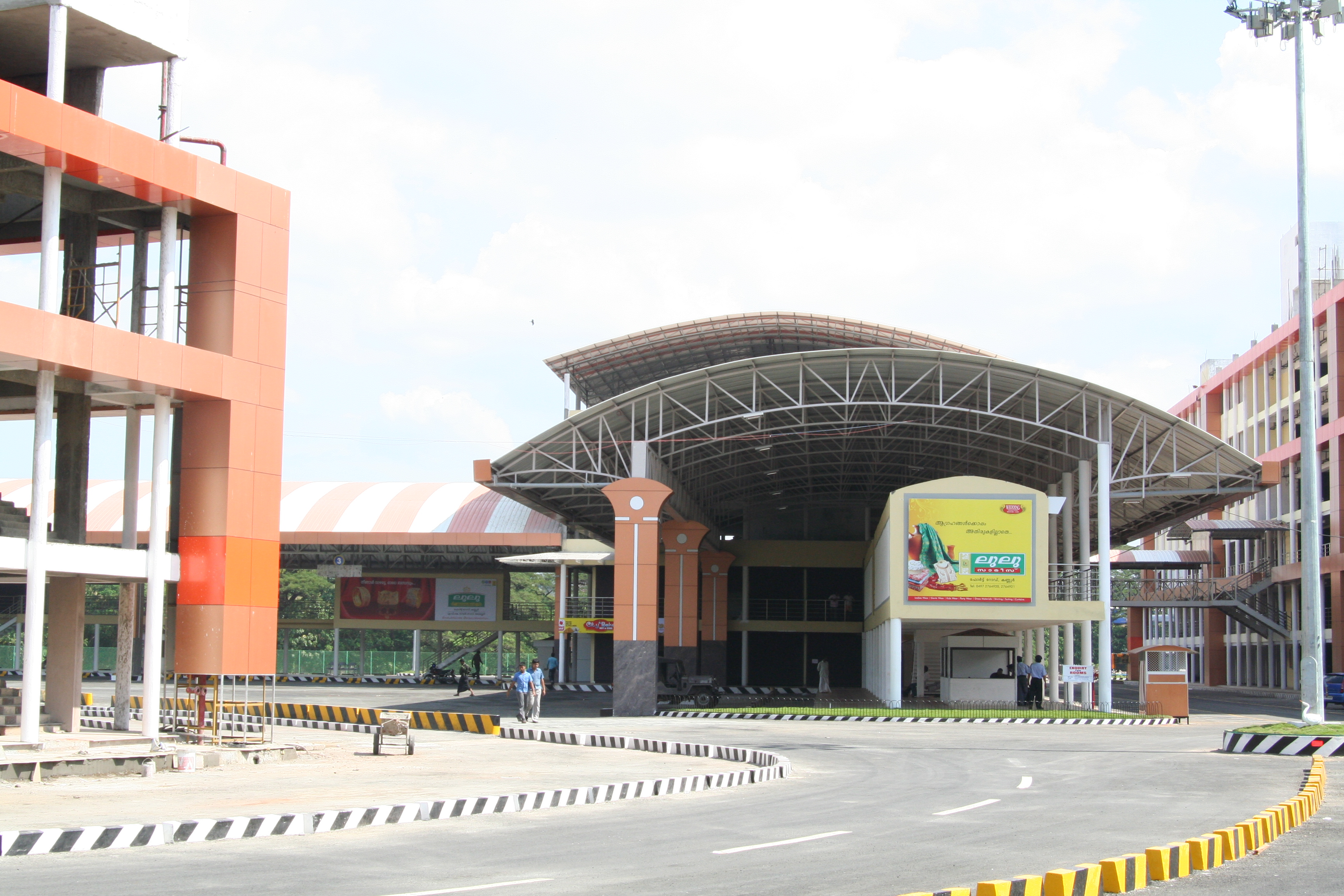 New bus stand - Kannur